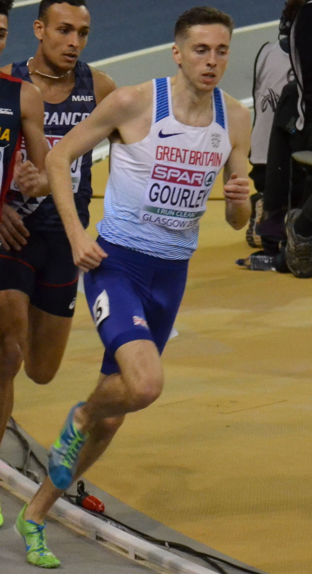 Mens 1500m